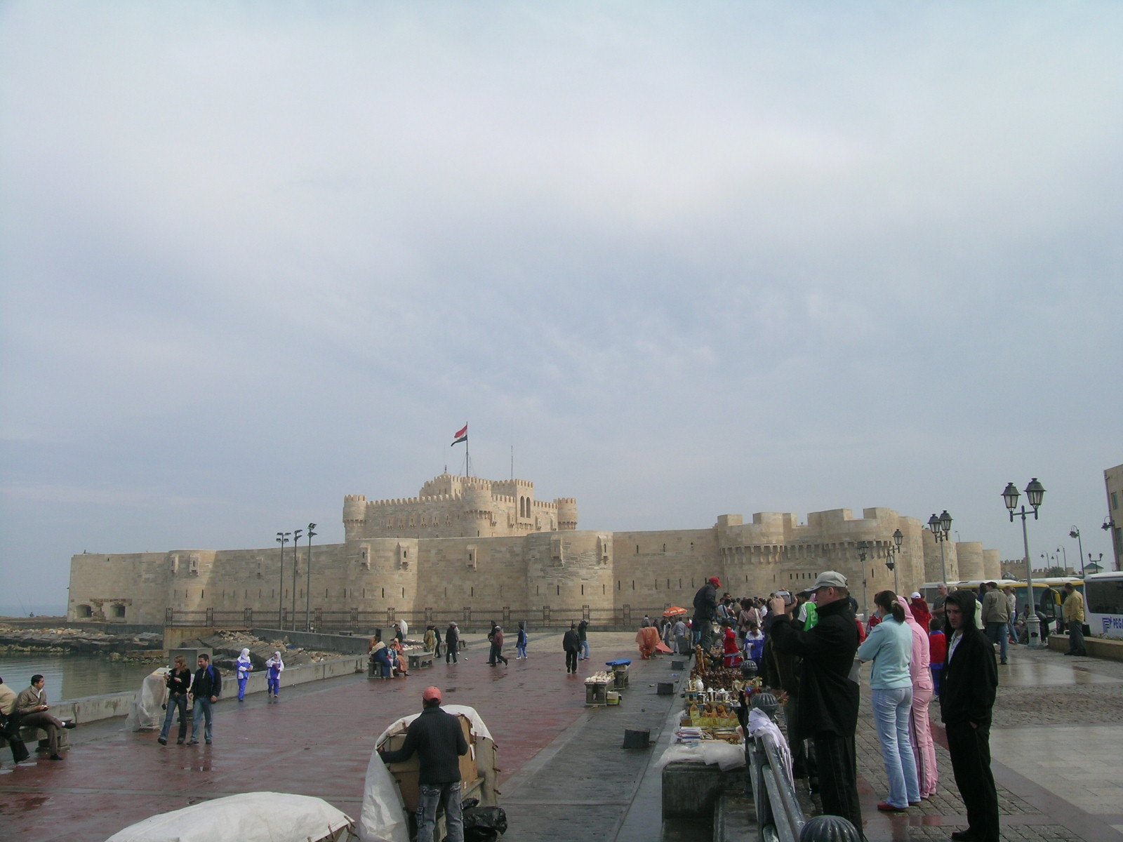 fotoğraf benim eserimdir. şubat 2007 de kendim çektim EROL ÇAĞLAR